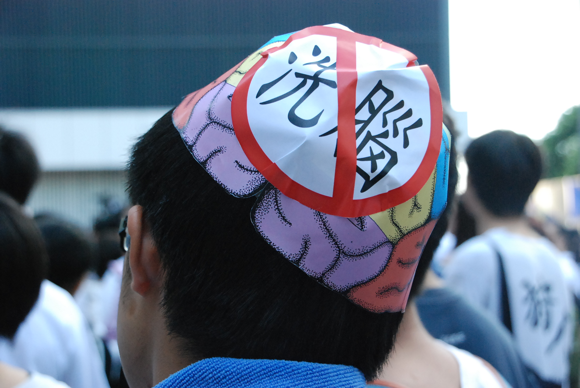 參與遊行的人士戴上反洗腦的道具